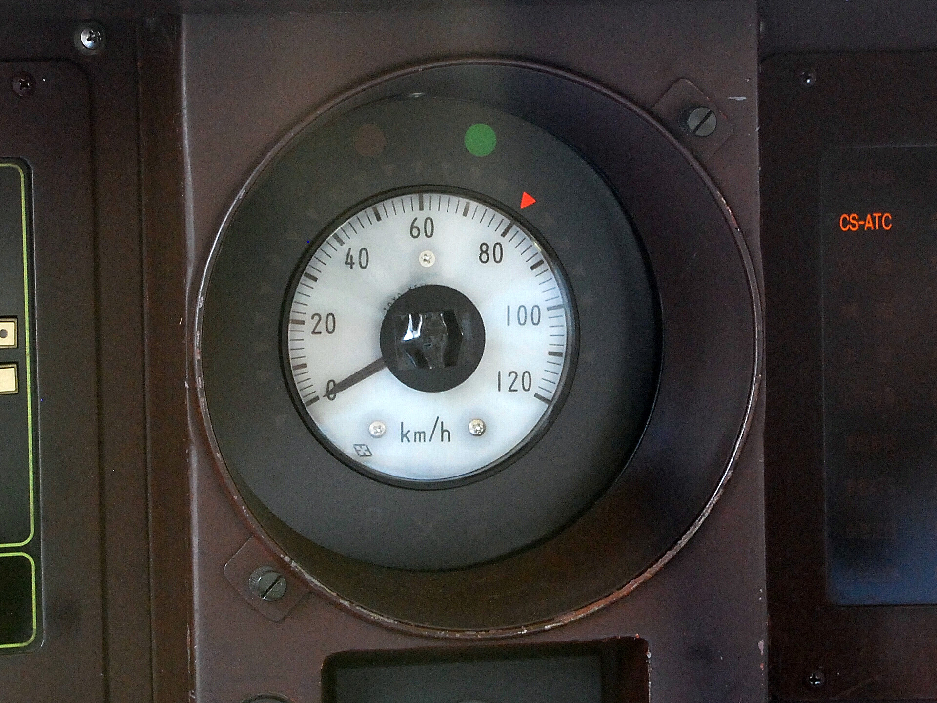 CS-ATCの車内信号表示（乗務員室の窓越しから撮影）